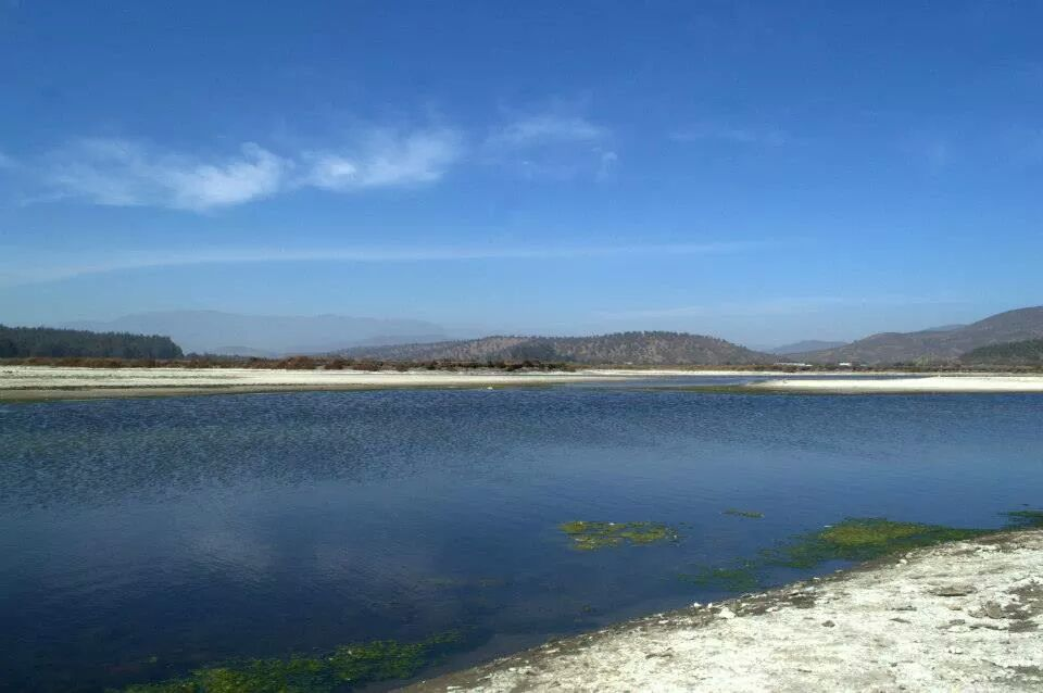 Las Salinas de Pullally se ubican al noroeste de la Región de Valparaíso, en la comuna de Papudo, a unos 150 KM de Santiago. El humedal está constituido por la playa de Longotoma y la desembocadura de los ríos La Ligua y Petorca, los cuales se juntan antes de salir al mar.